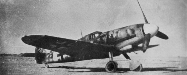 a Messerschmitt Me 109G fighter aircraft